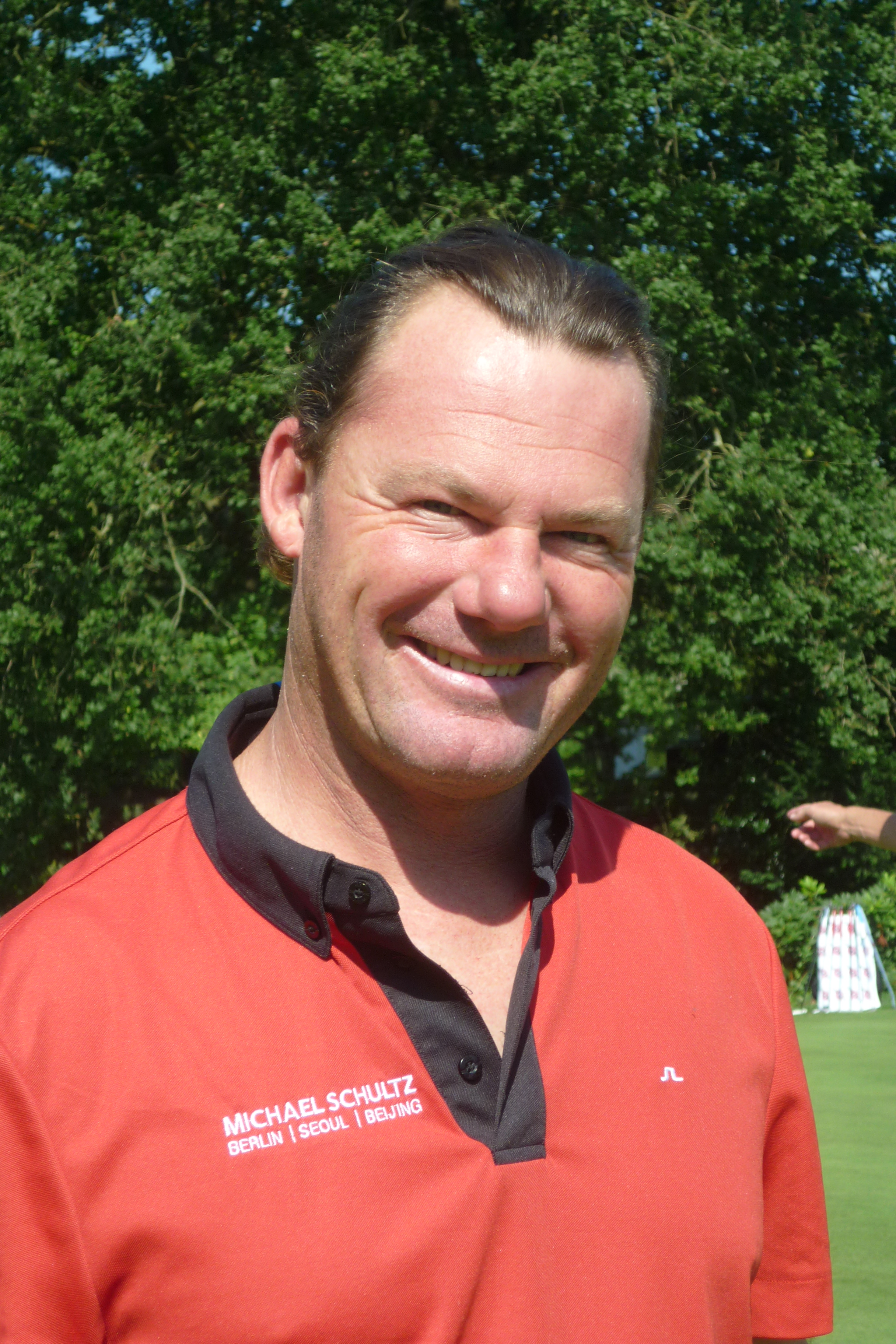 Alex Cejka